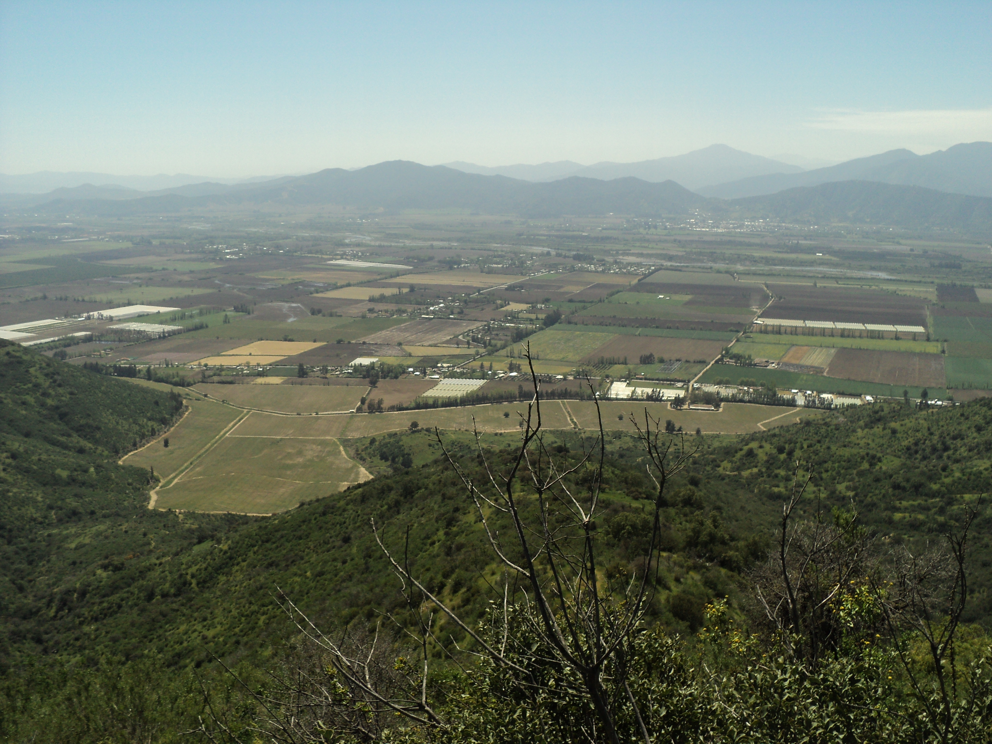 Vista panoramica del valle del Cachapoal, desde la comuna de Pichidegua, Chile